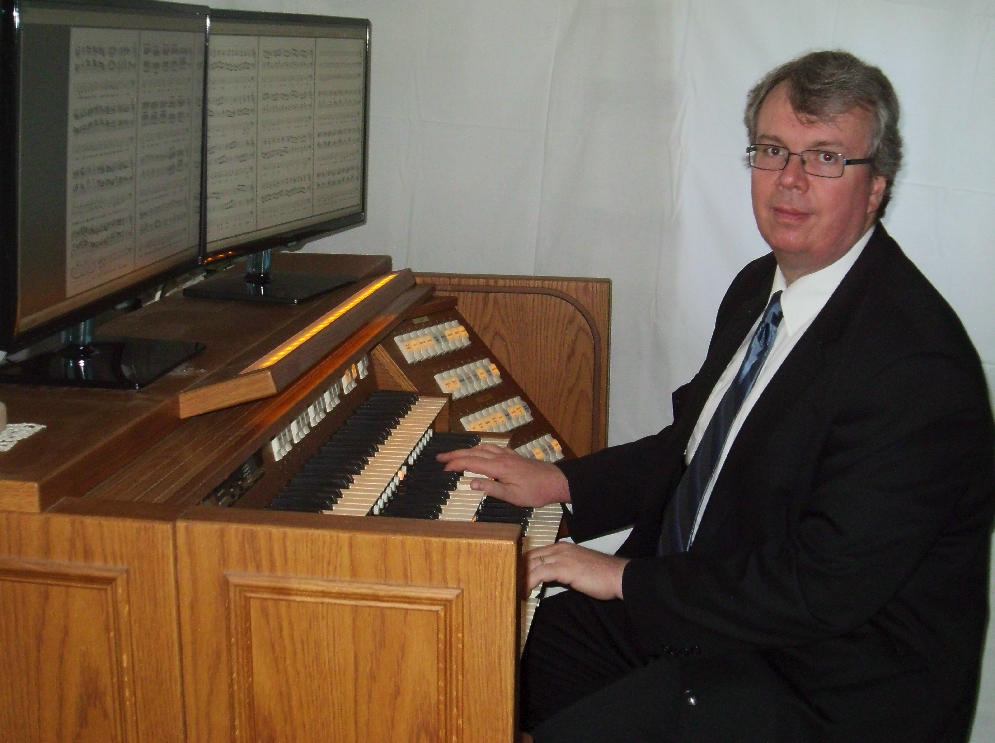 Michael Stenov an der eigenen Viscount-Orgel fotografiert am 27. 8. 2014